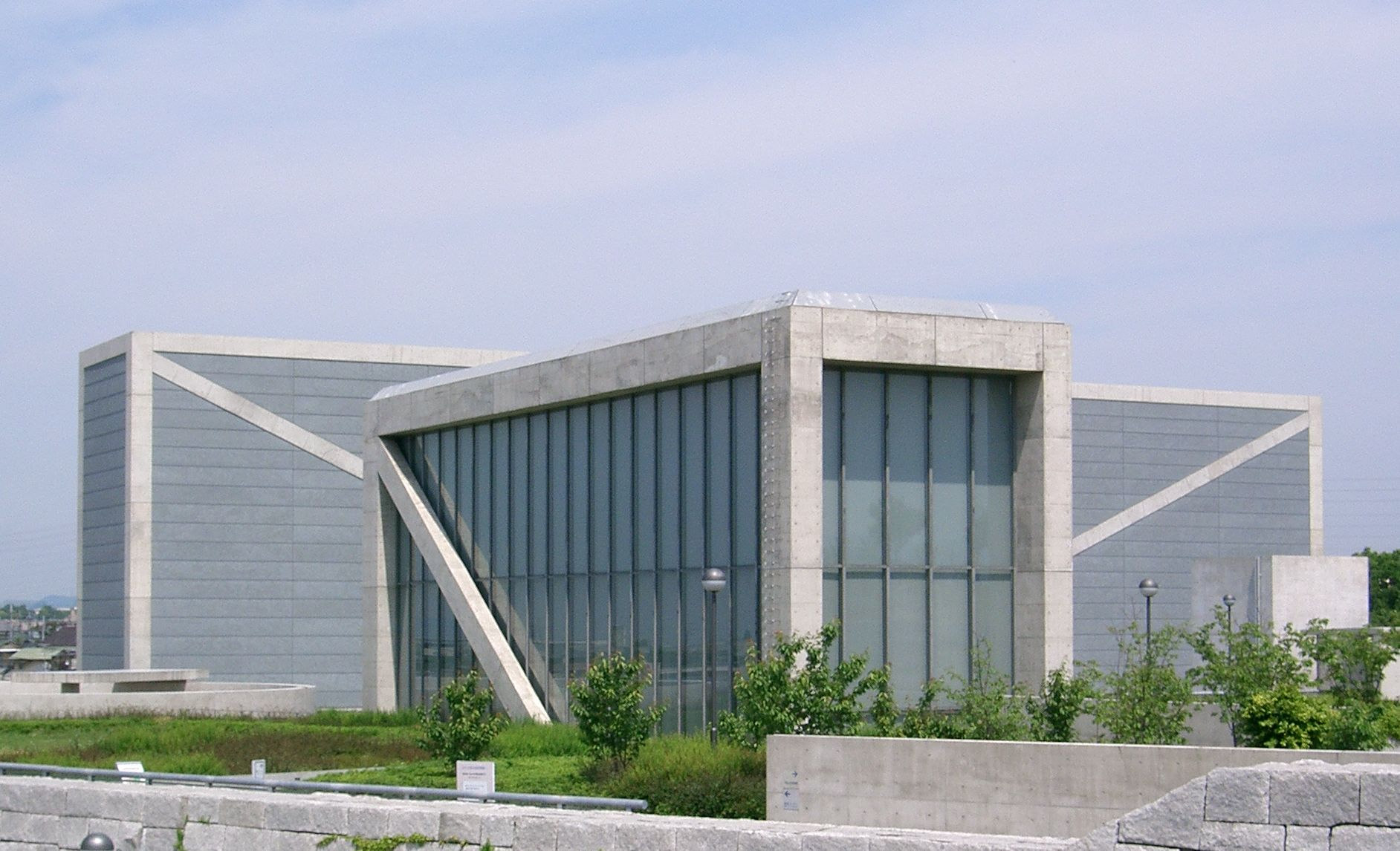 Osaka Prefectural Sayamaike Museum